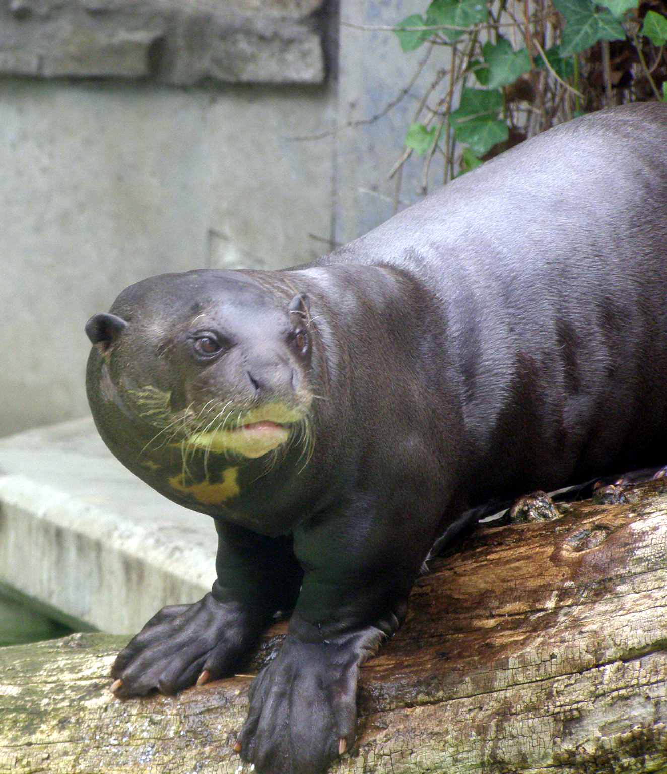 Pteronura brasiliensis Totals 16 13 0 5